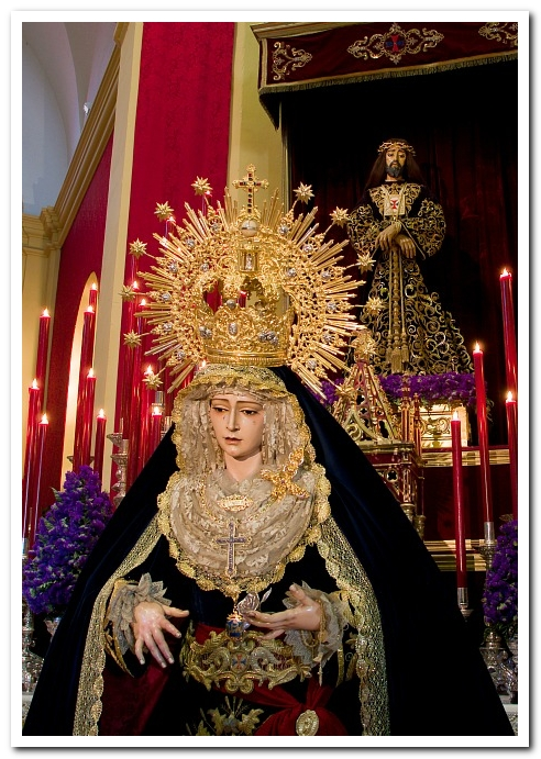 Besamano extraordinadio